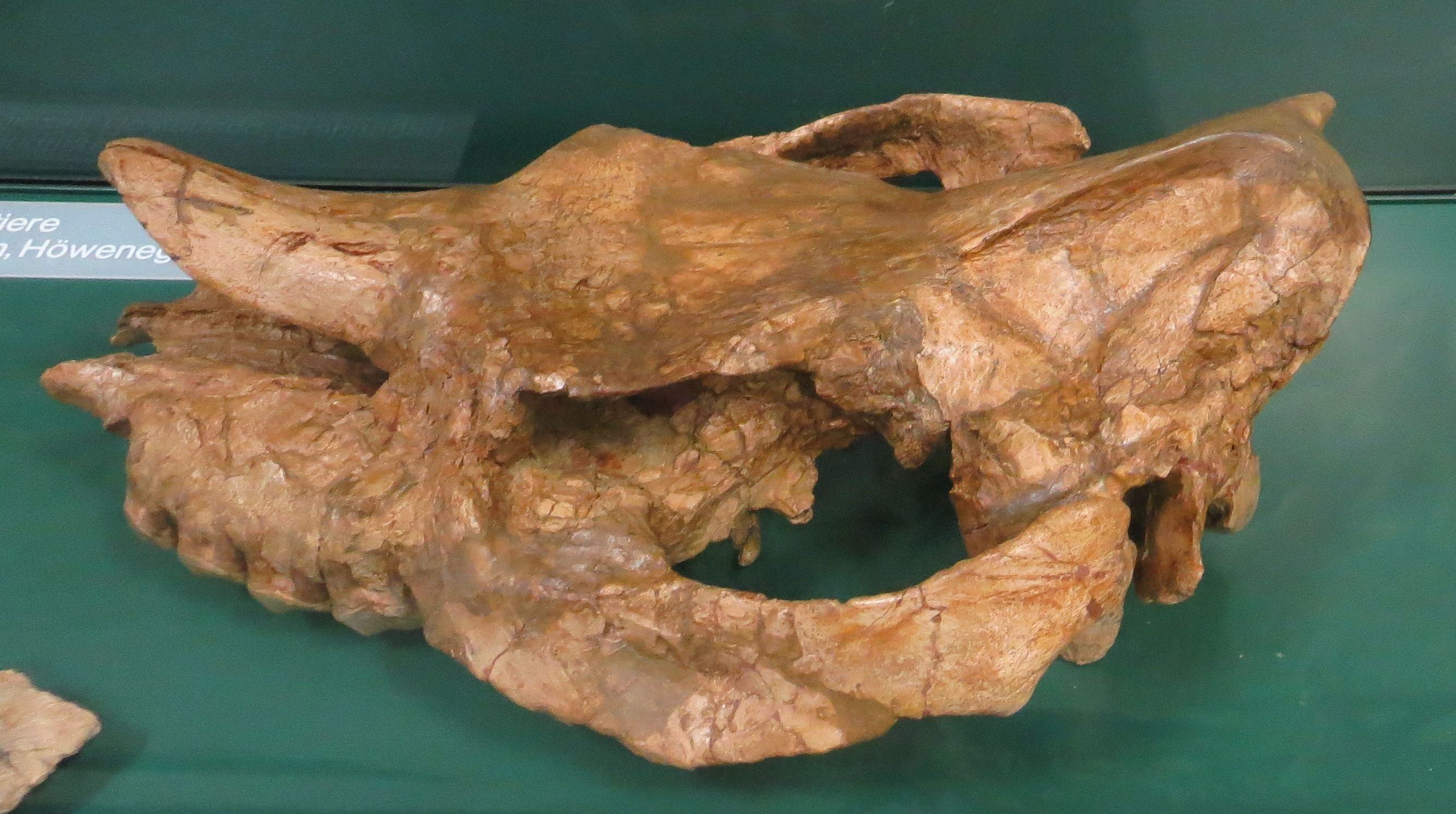 Fossil - Took the picture at Natural History Museum, Karlsruhe